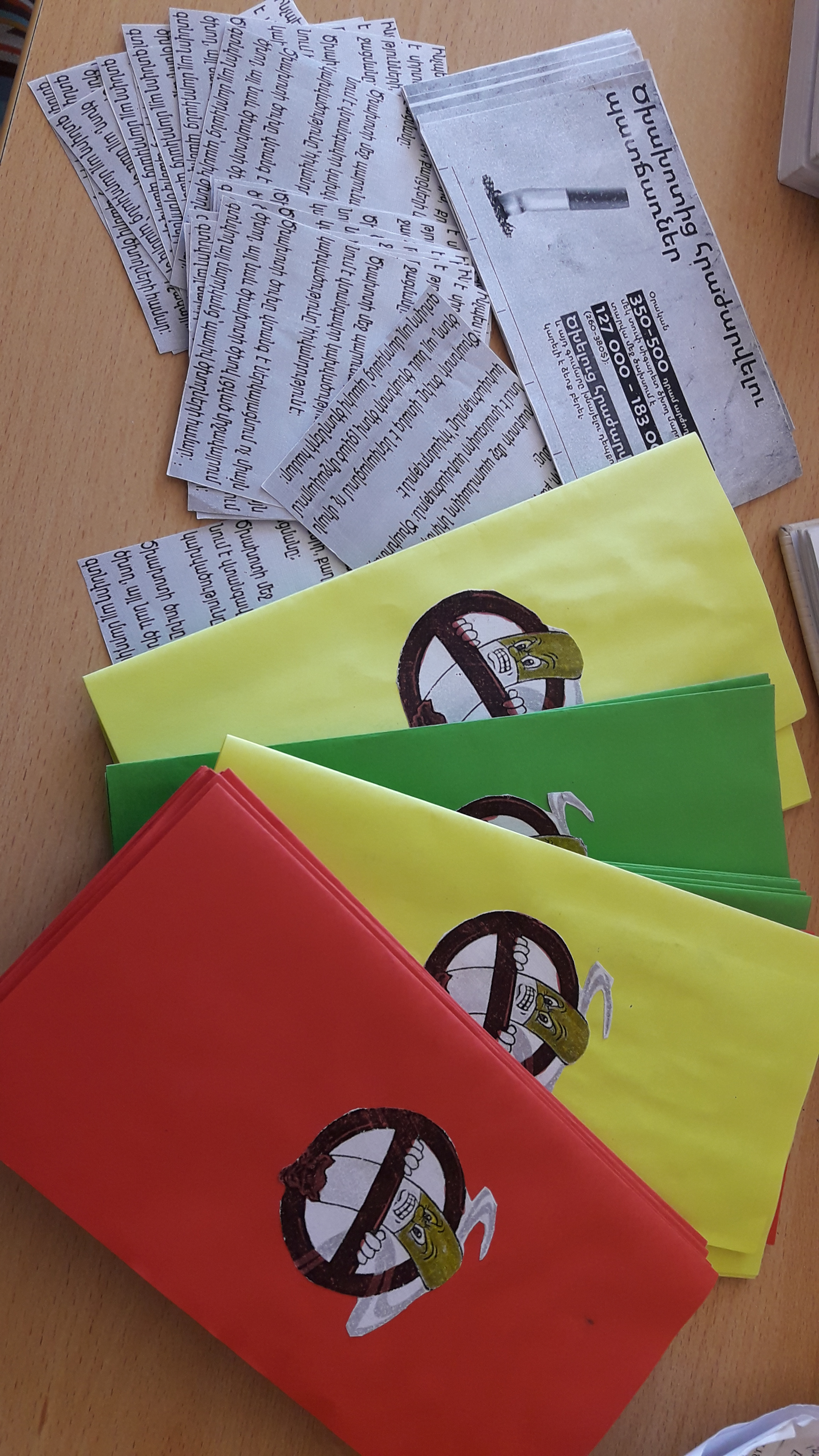 Հակածխախոտային միջոցառումներ